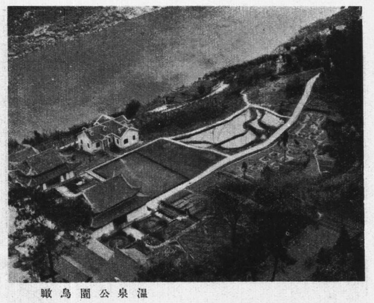 鄭璧成著四川導遊插圖